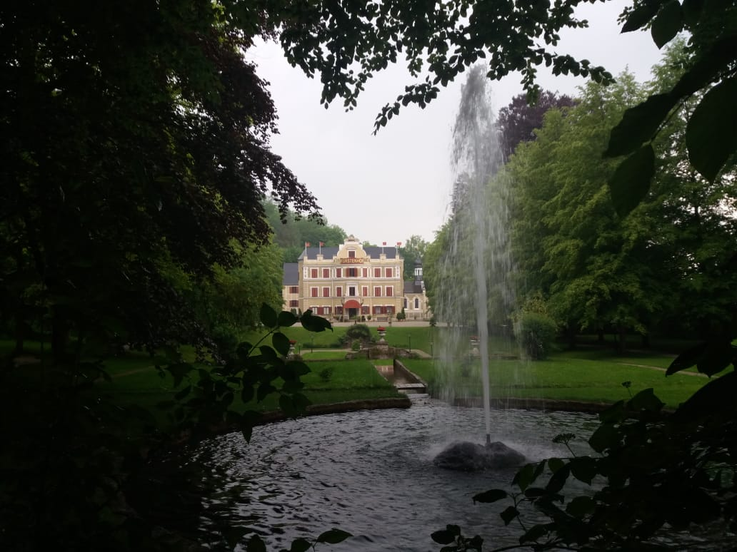 Das Vagener Schloss (2018)